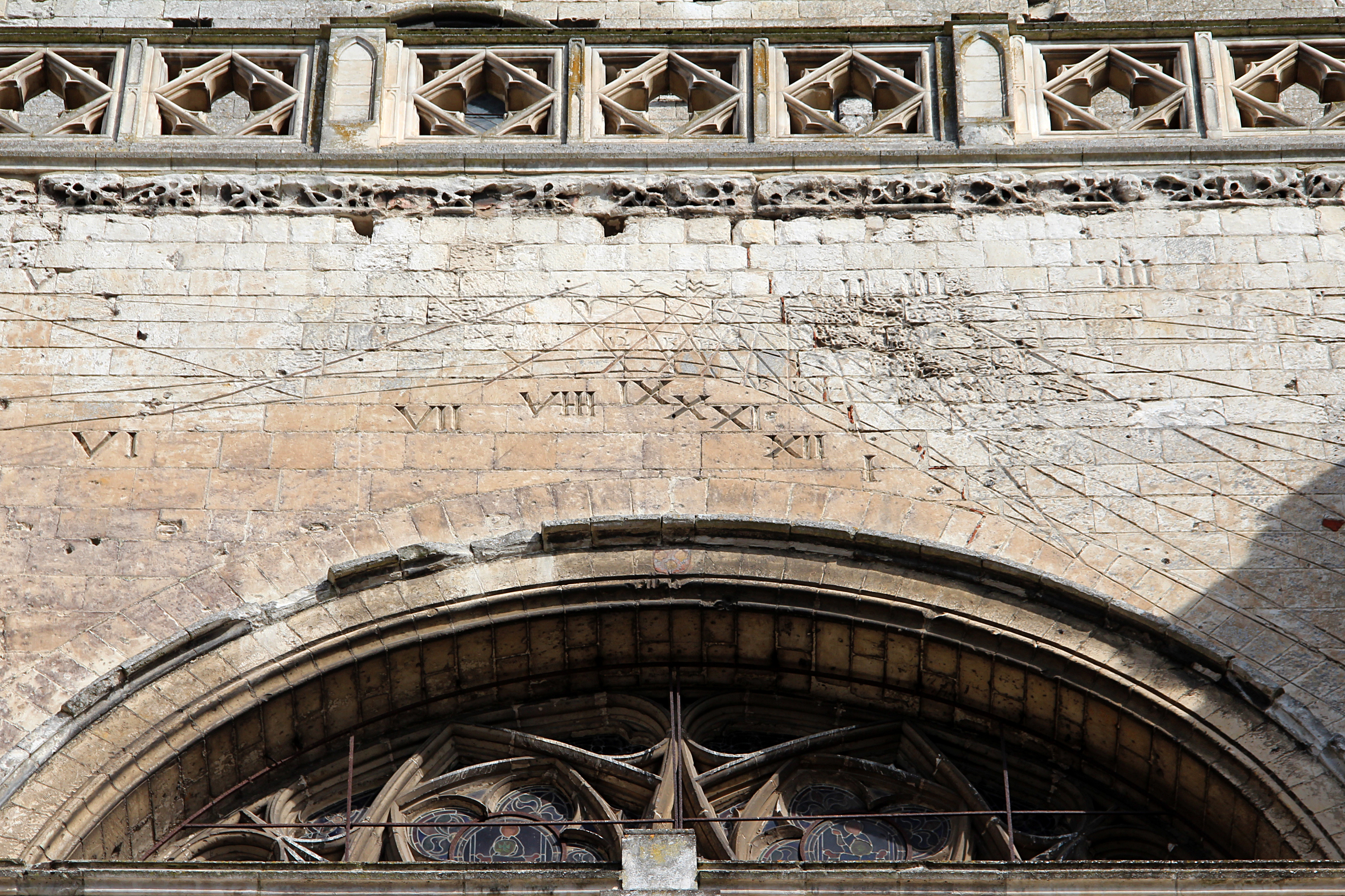 Saint-Omer (Pas-de-Calais - France), Cathédrale Notre-Dame - Cadran solaire de la cathédrale Notre-Dame (1610).